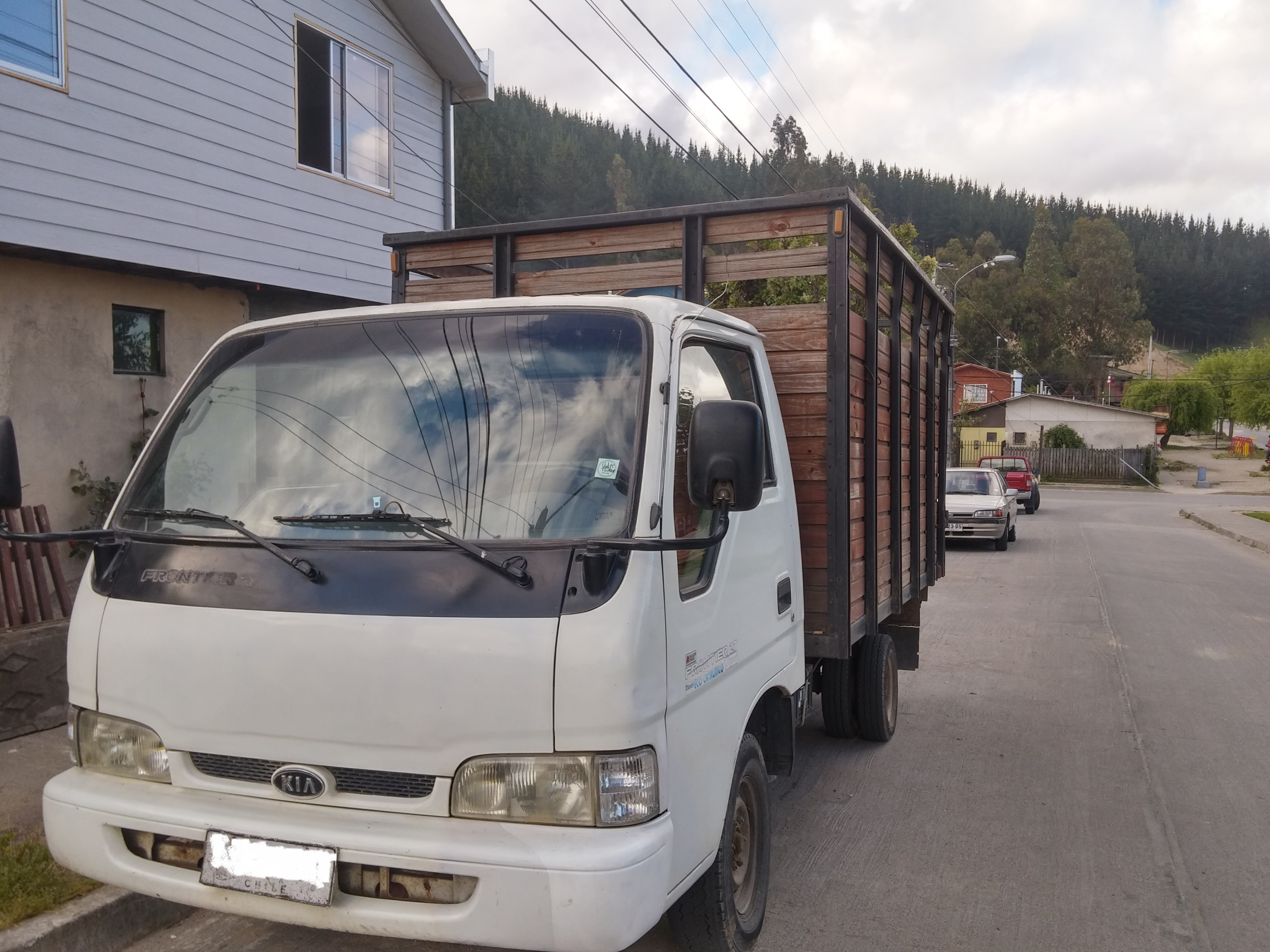 Kia Frontier 2.7 eco catalítico Año 2000